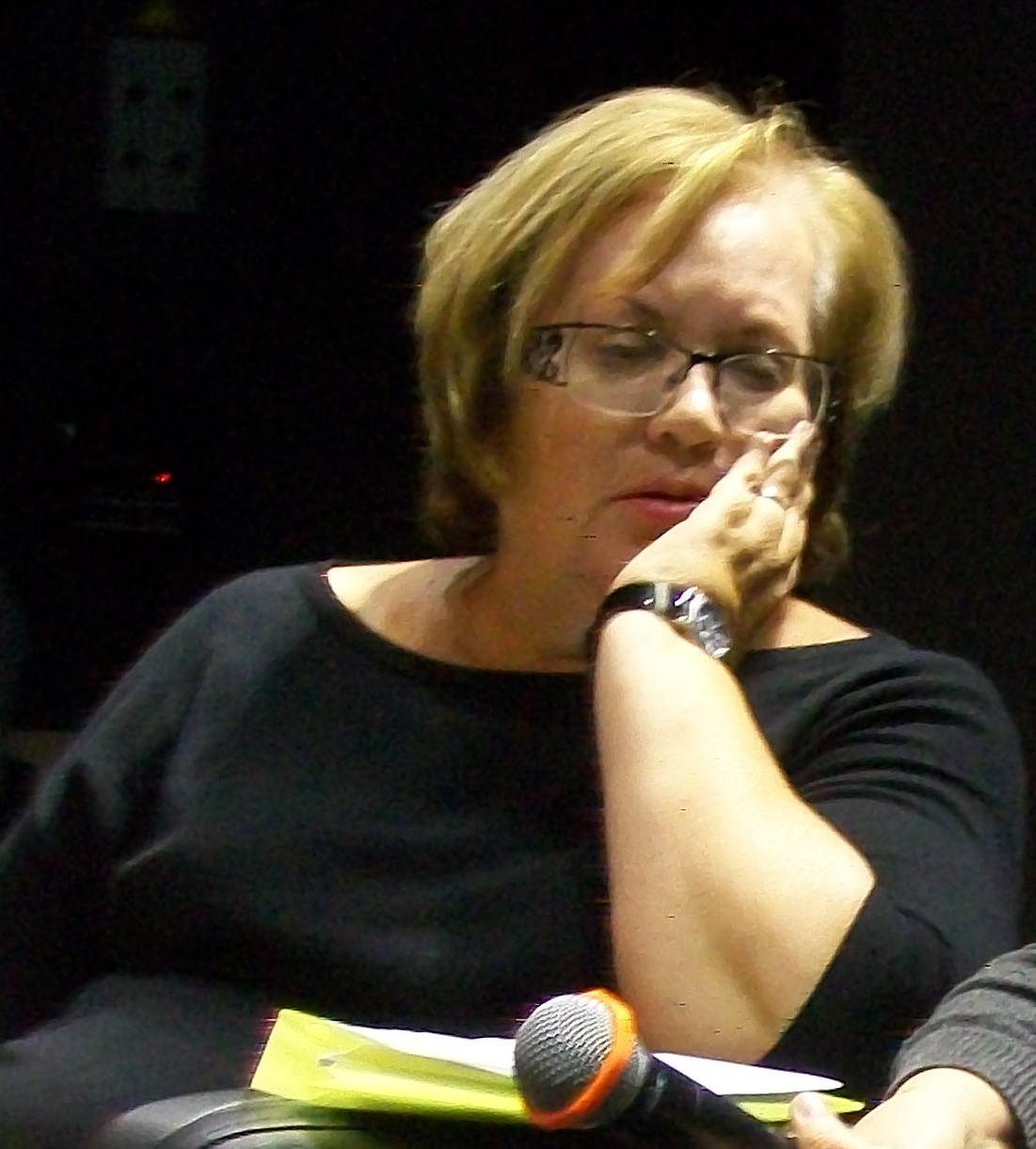 Уполномоченный по правам человека в Свердловской области Т.Г. Мерзлякова в Ельцин-центре (екатеринбург, октябрь 2016 года)